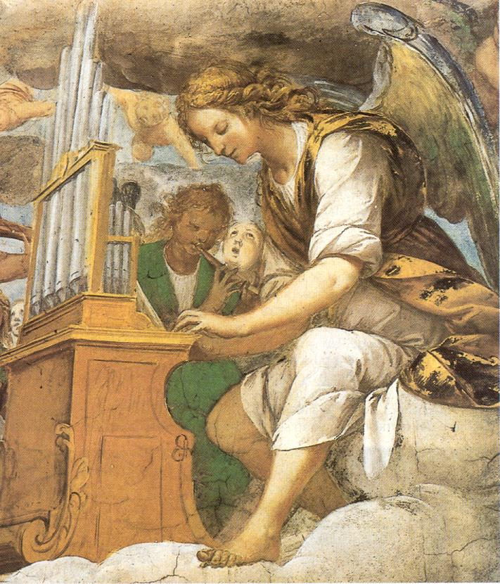 Fresque partie de voûte,S.Maria dei Ghirli, Campione d'Italia (lac de Lugano)